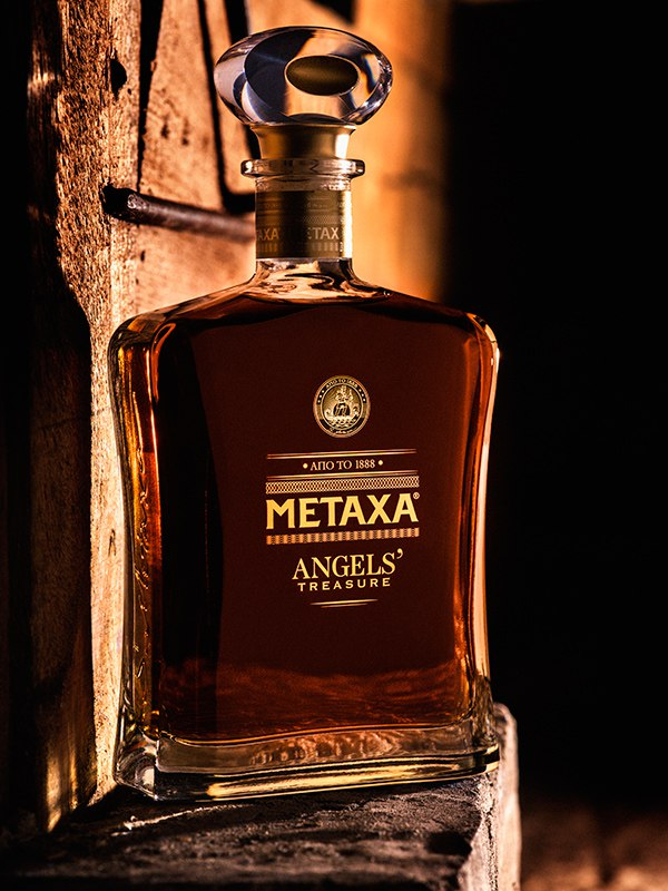 MEtaxa Angels